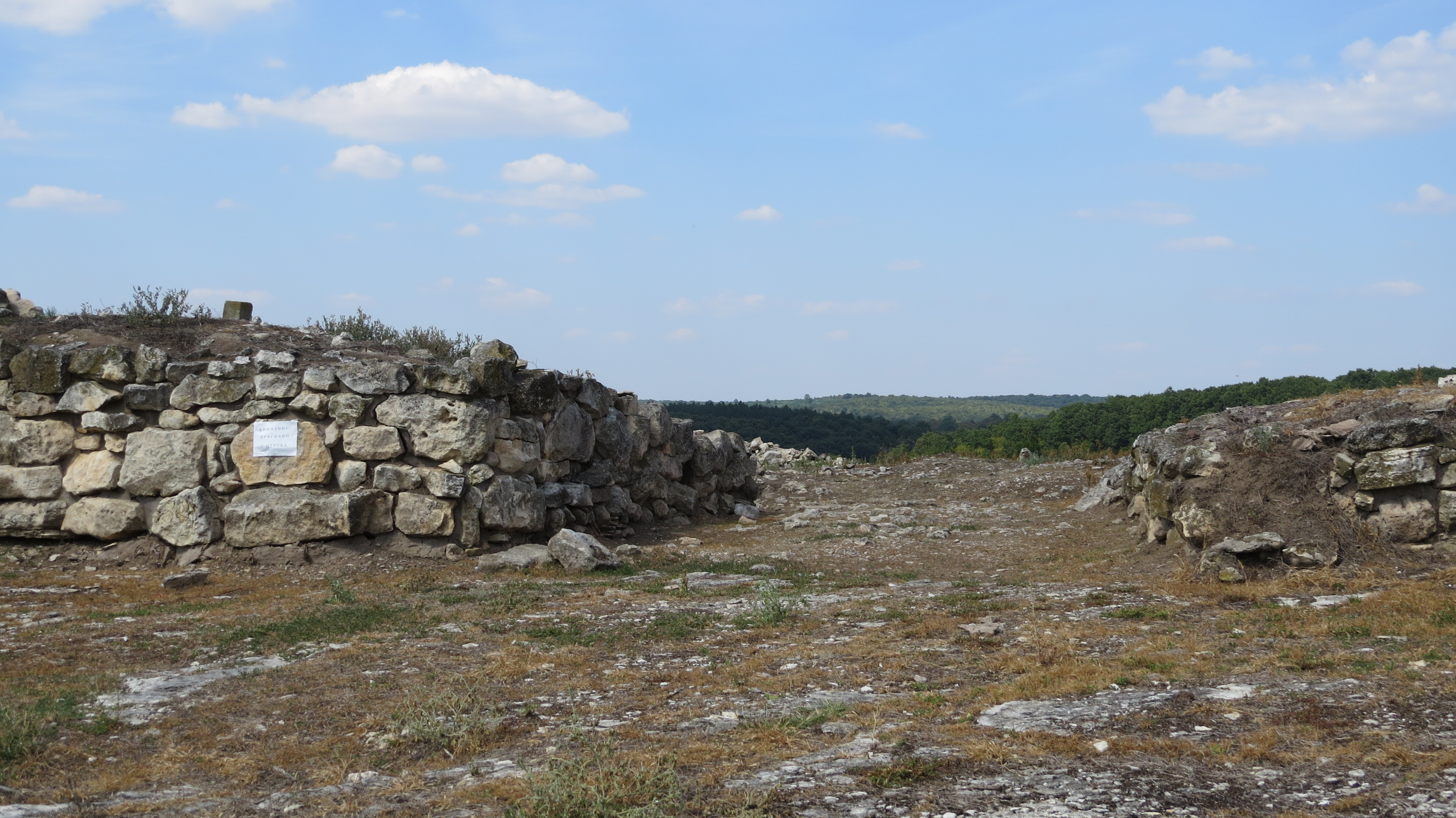 Ostanki južnih mestnih vrat antičnega getskega mesta Helis pri vasi Sveštari, Bolgarija.